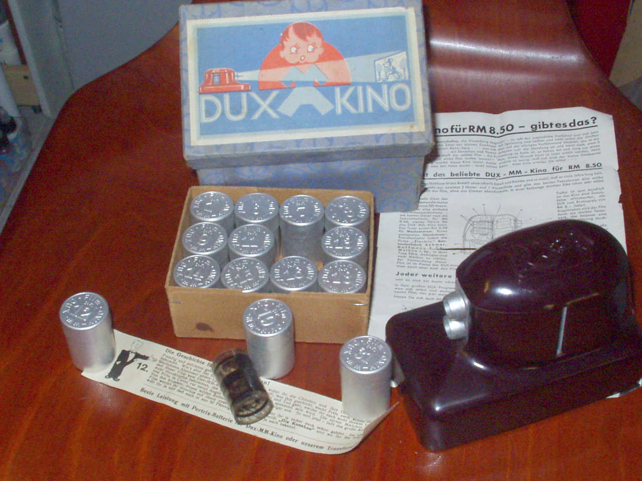 Dux-Kino